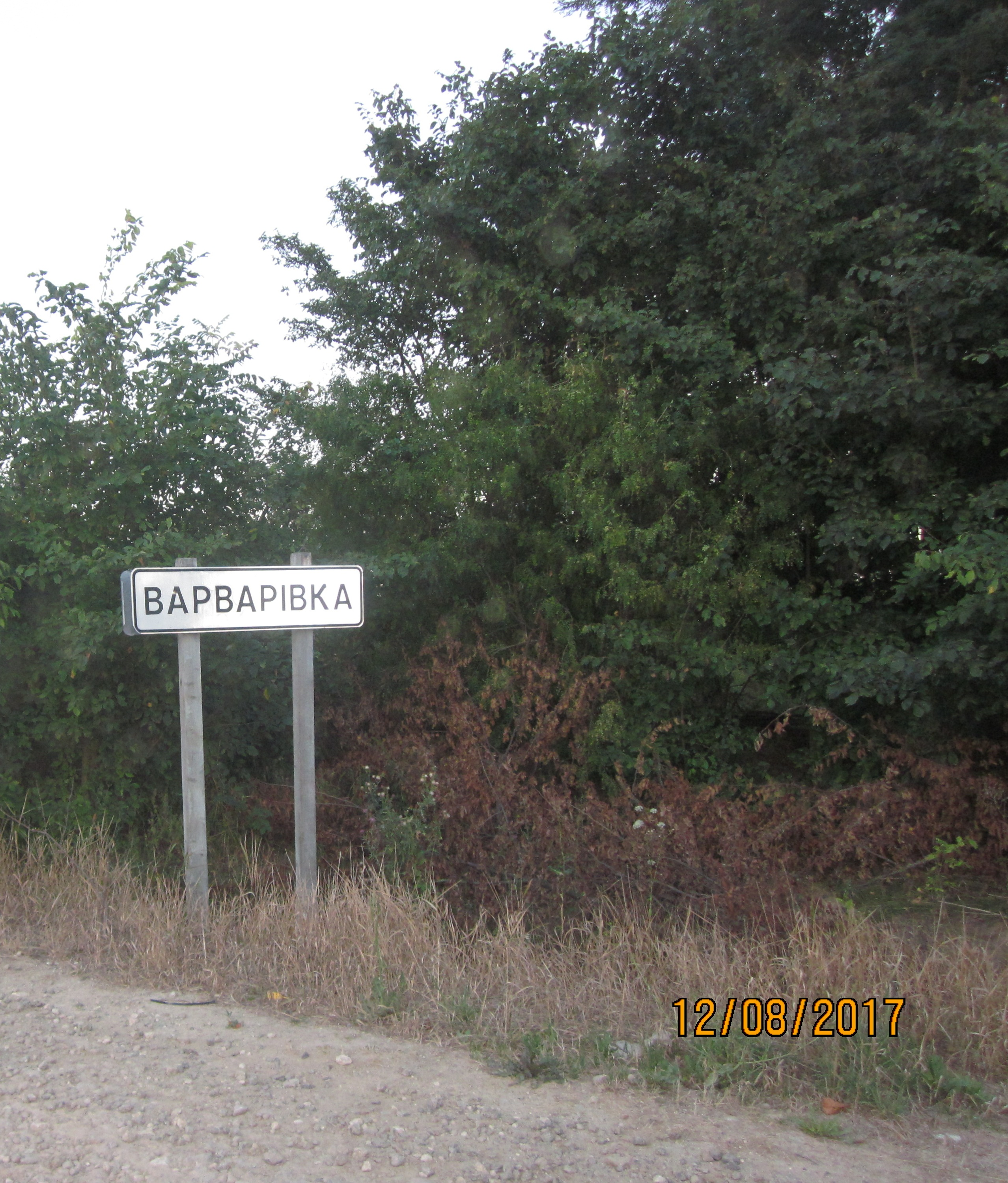 В'їзд до села Варварівка